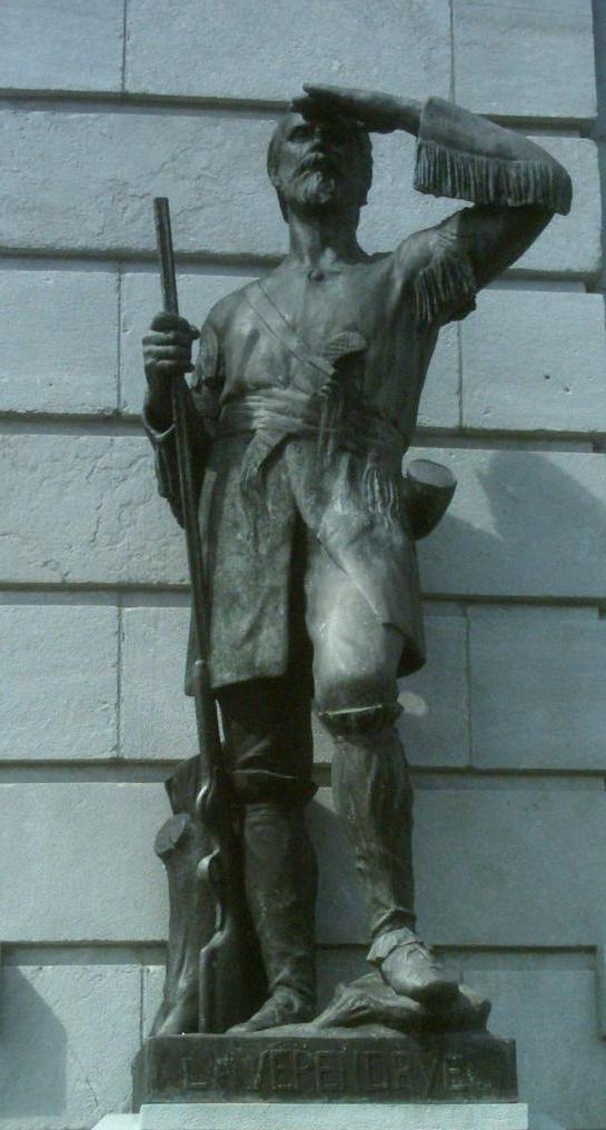 Pierre Gaultier de Varennes et de la Vérendrye (1685-1749), sculpture devant l'hôtel du Parlement de Québec, aile droite, série des découvreurs